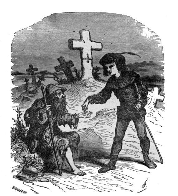 Pour la source voir : Discuter:Contes d'Andersen Vignettes de Bertall illustrant le conte Le Compagnon de voyage.